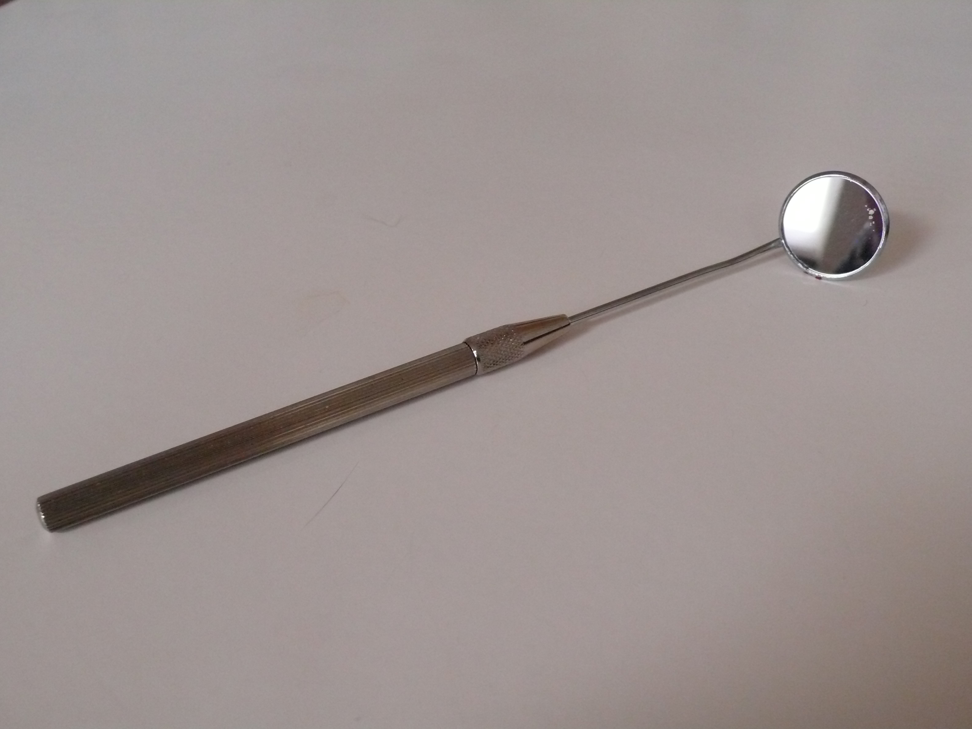 Larynxspiegel der Hals-Nasen-Ohren-Heilkunde